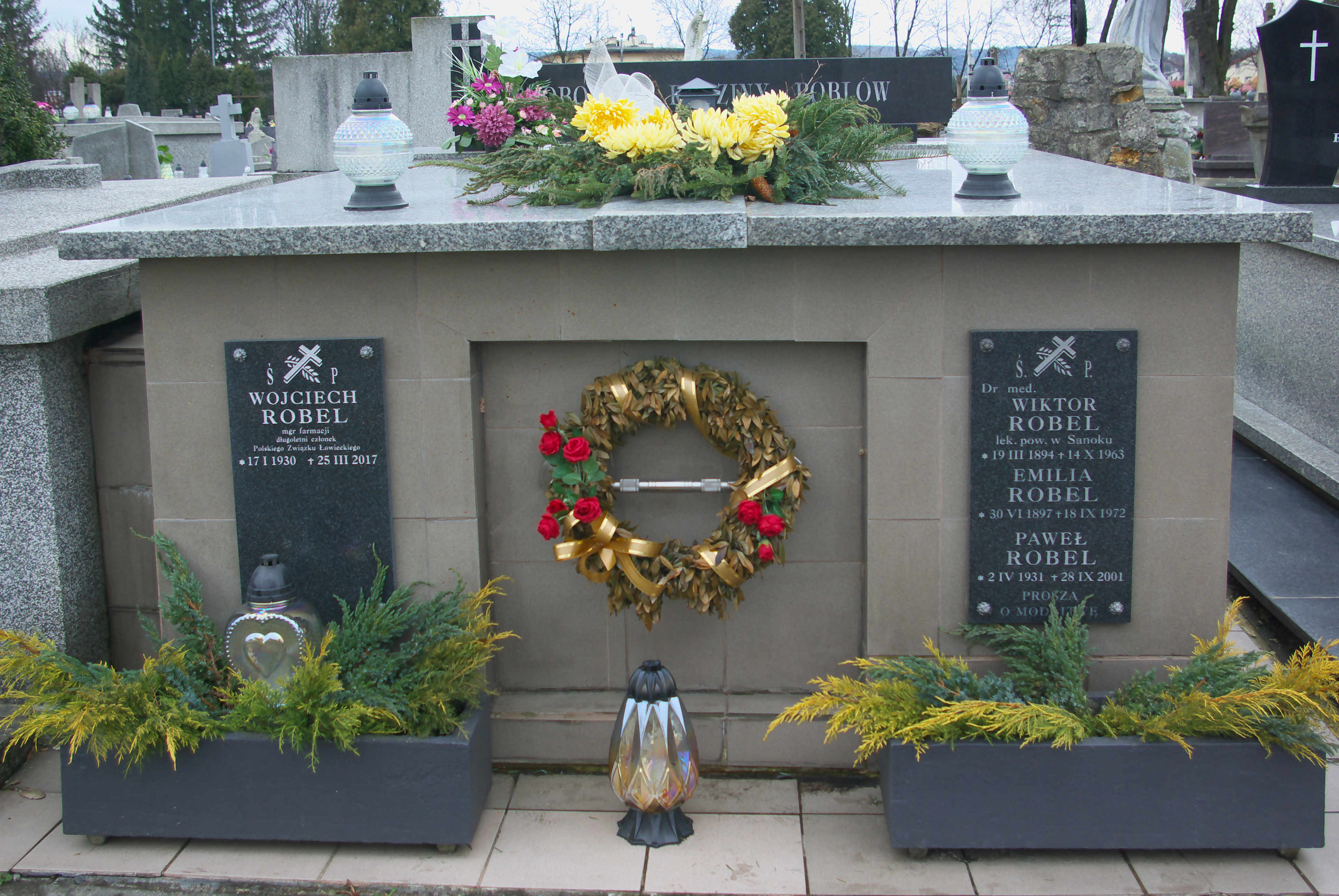 Grobowiec rodziny Robel na Cmentarzu Centralnym w Sanoku.